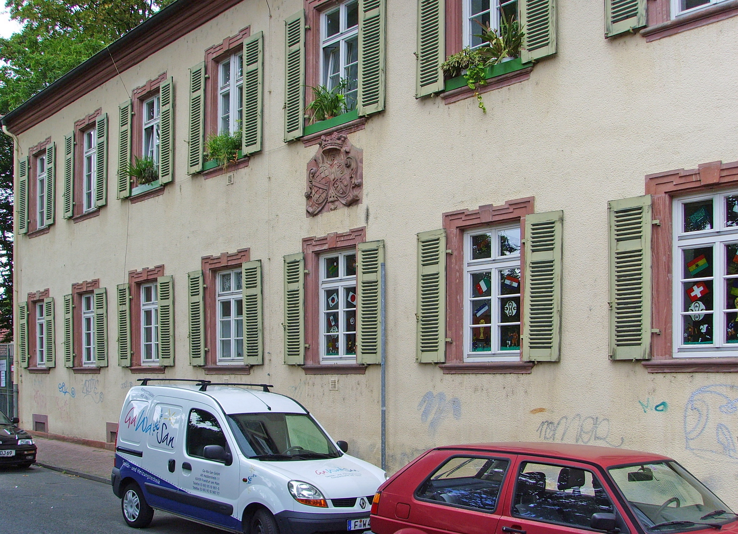 Das sogenannte Neue Schloss in Frankfurt am Main-Heddernheim, erbaut um 1740